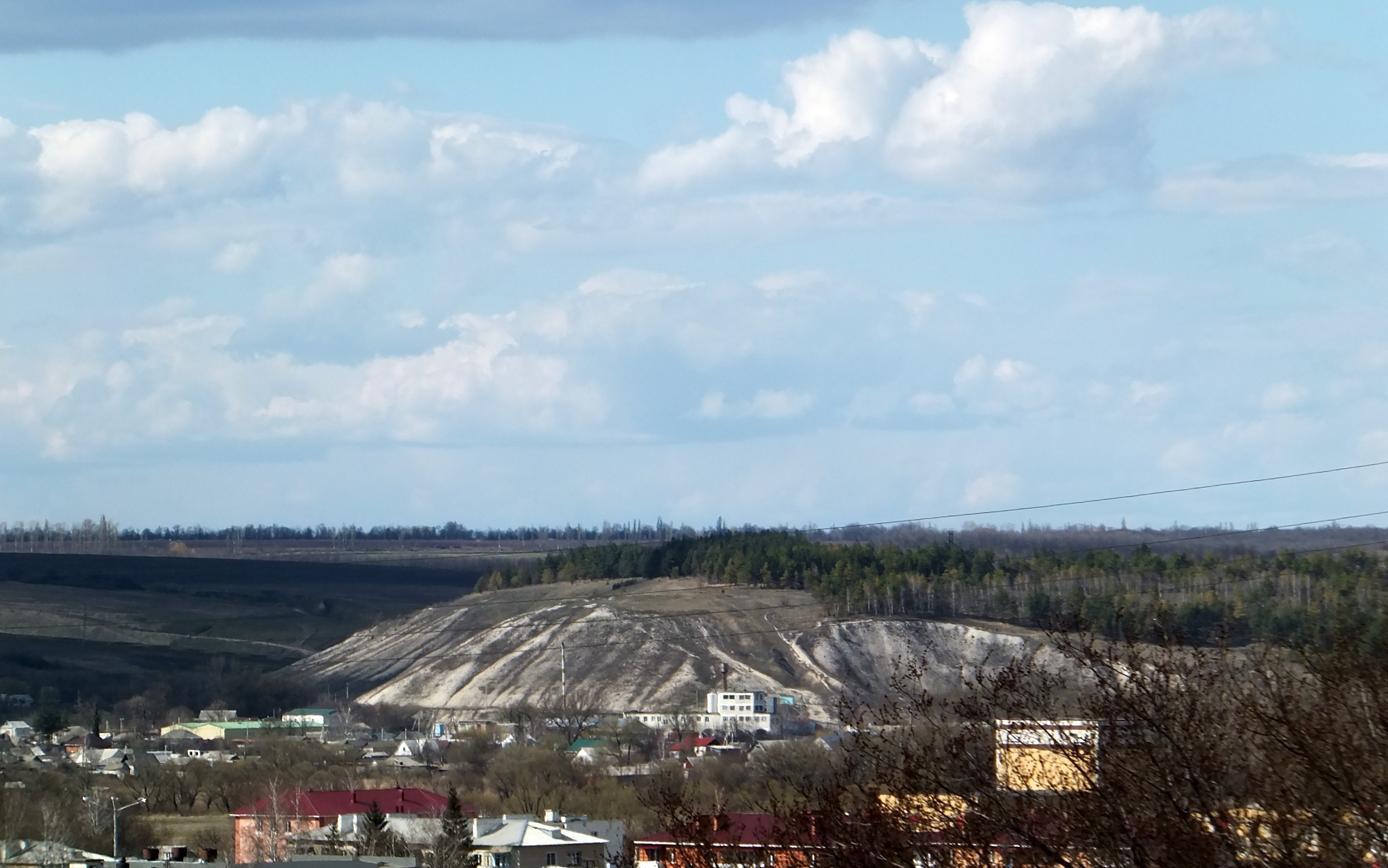 Белая гора, Корочанский район This image is related to the protected area of Russia number 3110230